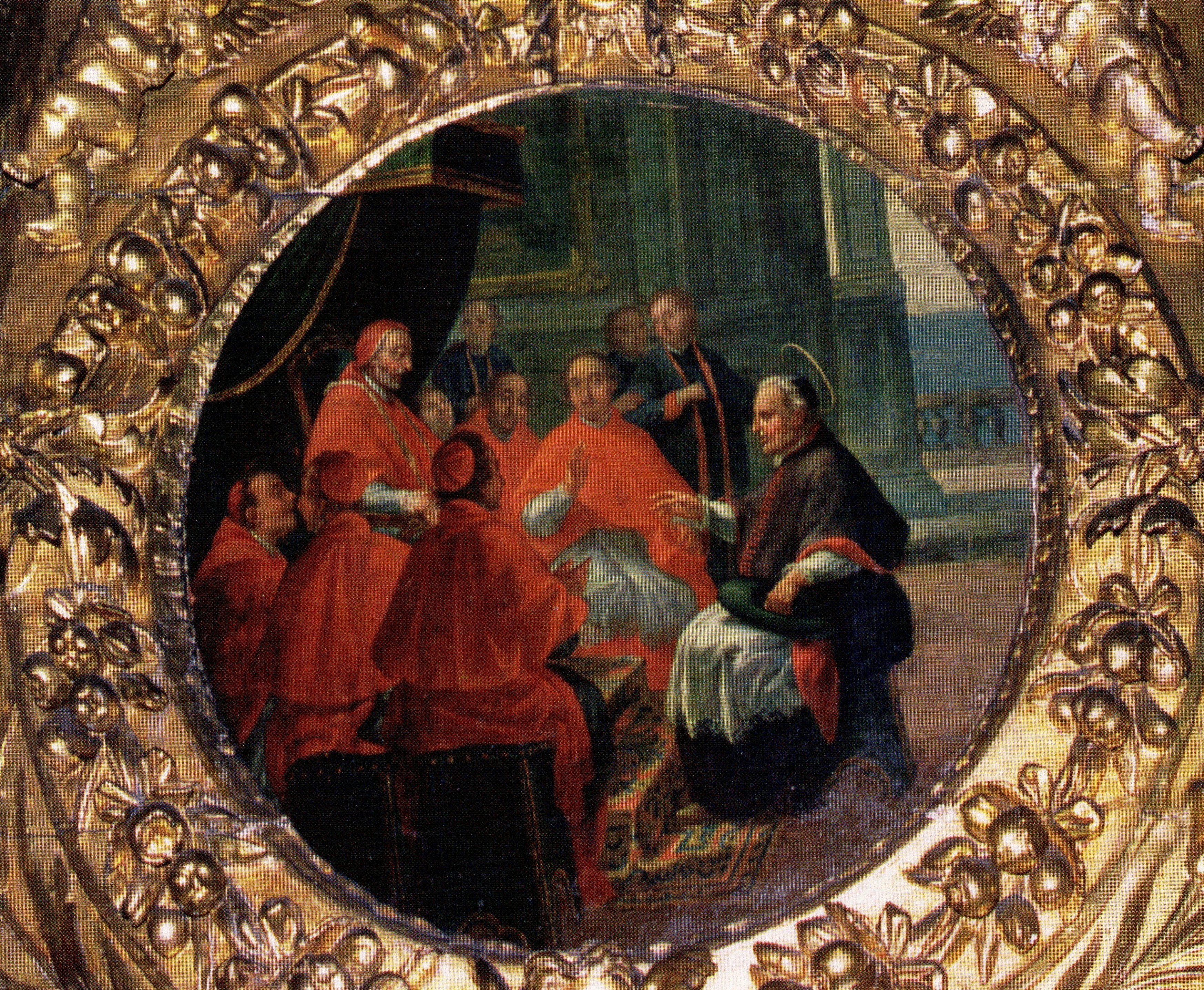 1759. Seu de Barcelona, capella del Sant Crist de Lepant, Manuel Tramulles i Roig